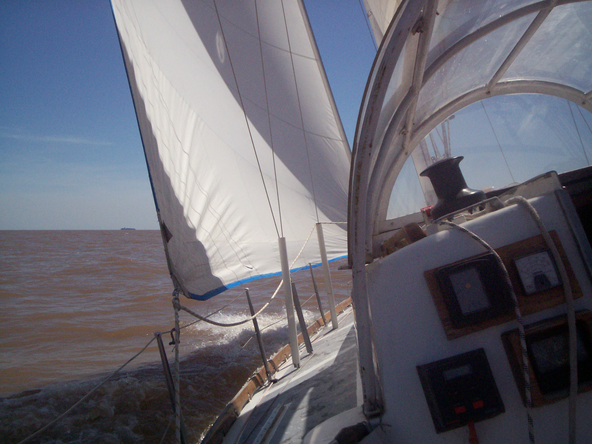 Velero ciñendo en el Río de La Plata, 26 de noviembre de 2005.